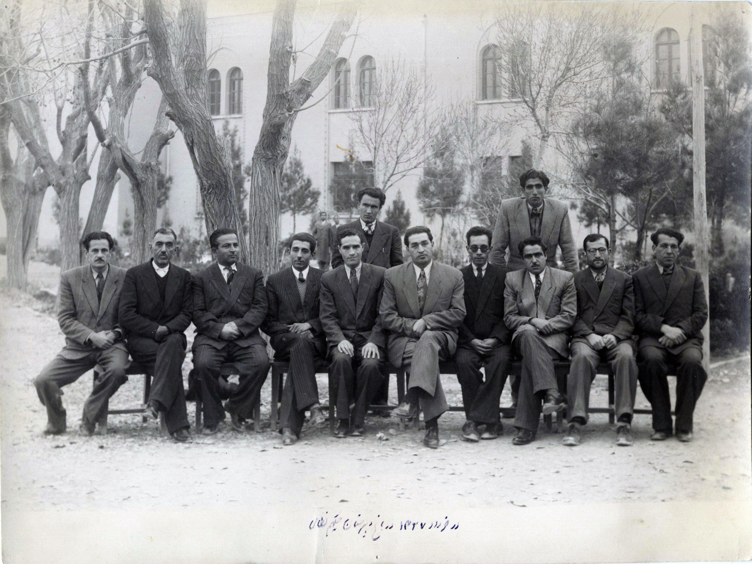 دبیران دبیرستان حکیم نظامی در دی ماه 1327؛ نشسته از راست: محمد صاحب نسق، مرتضی جوادی ابهری، علی اکبر شهابلو، علی اصغر فقیهی، تقوی، جواد رهنما، سید عباس محمودیان، حسین کریمان، سید ابوطالب کروبی، سید احمد توکل ایستاده از راست: محمد ابوذری،صبحی